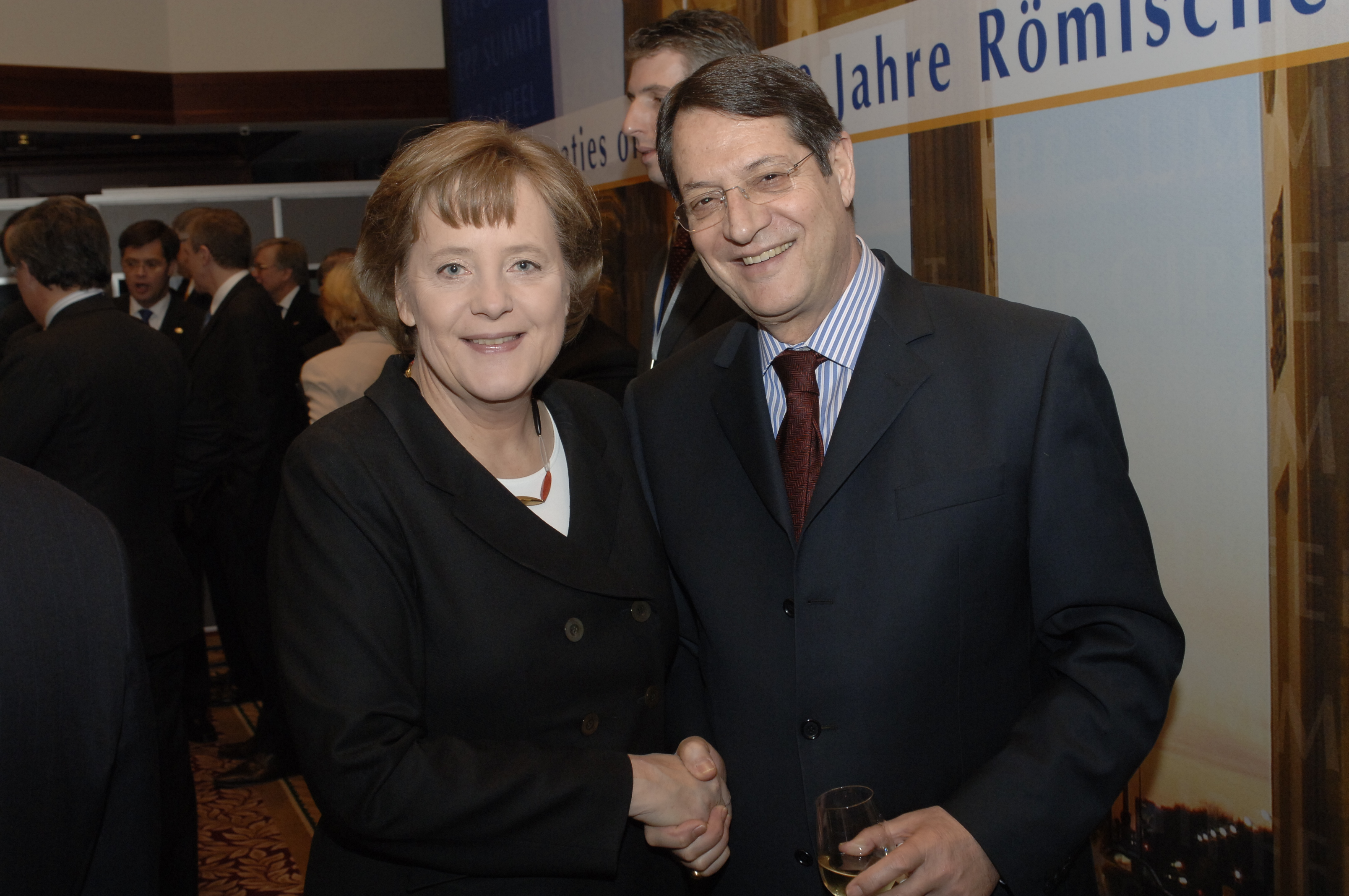 EPP Summit 24 March 2007